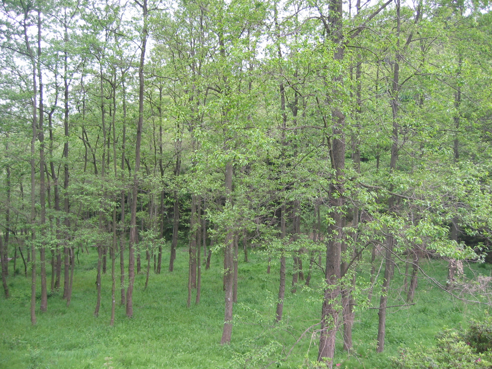 ハンノキ (学名：Alnus japonica)